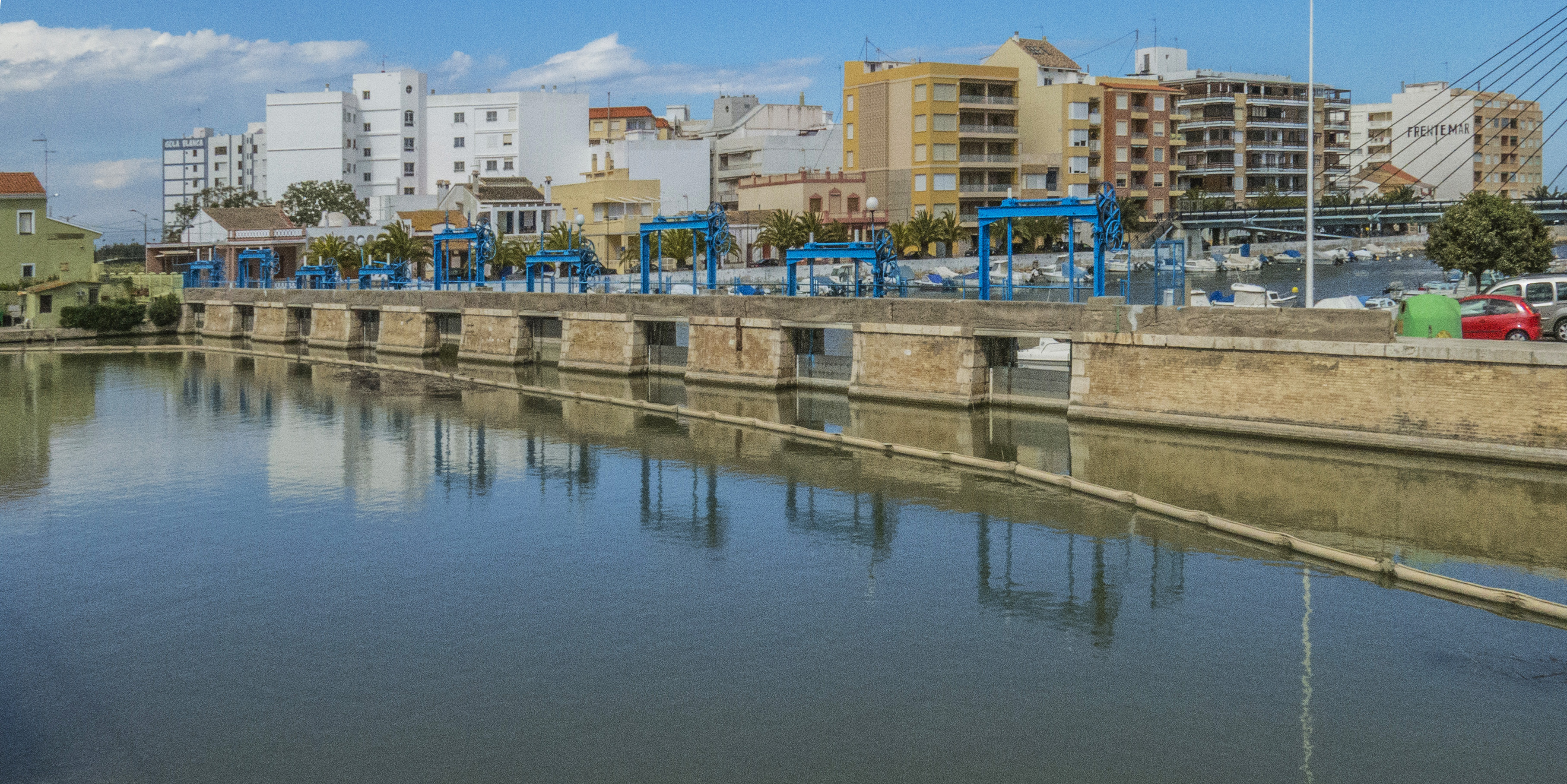 El Perelló és una entitat local menor que pertany al municipi valencià de Sueca. A la imatge, les comportes que s'utilitzen per regular el nivell de les aigües en l'Albufera, d'acord amb les necessitats agrícoles. (Viquipèdia)